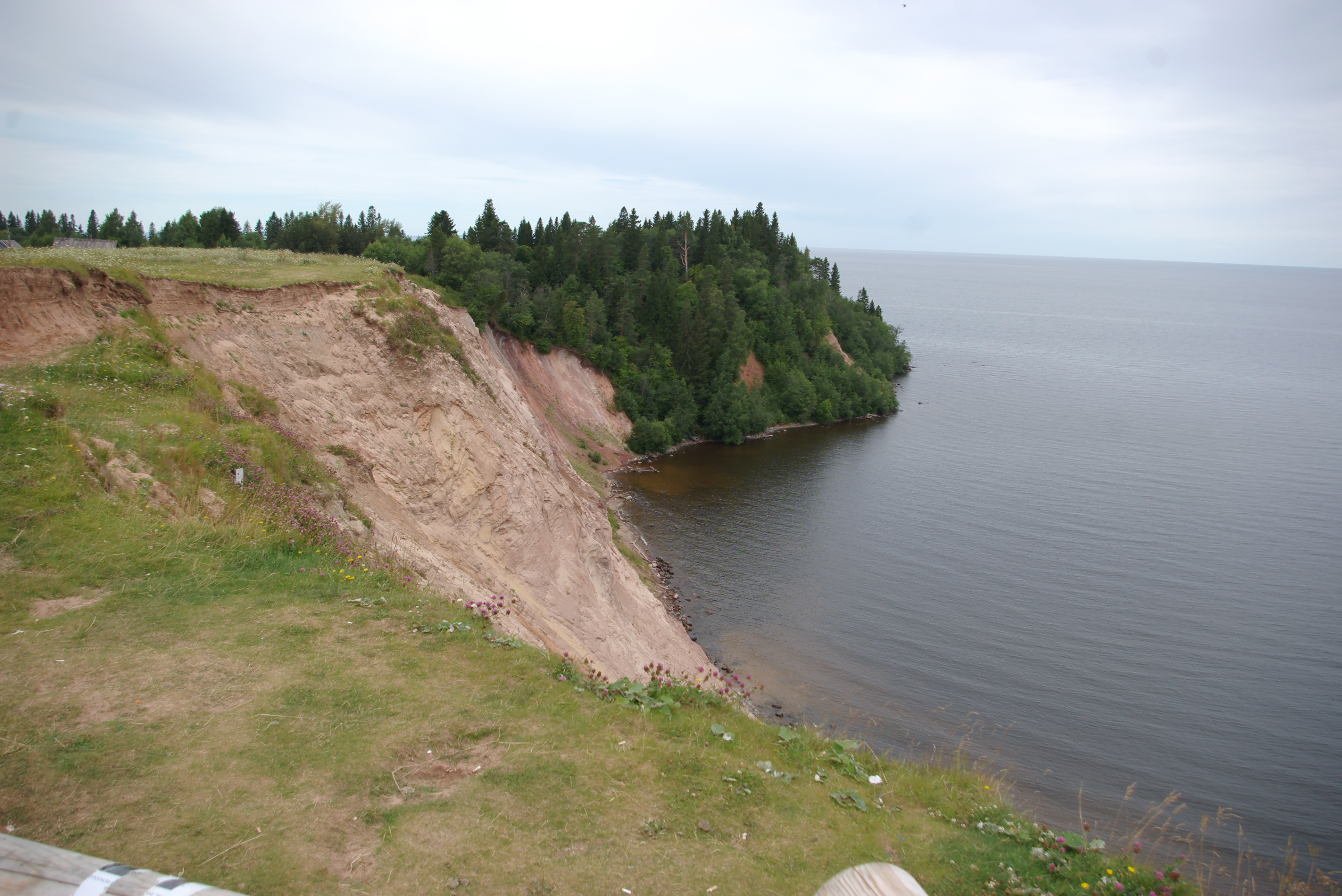 Андомская гора: Вытегорский район, This image is related to the protected area of Russia number 3510093